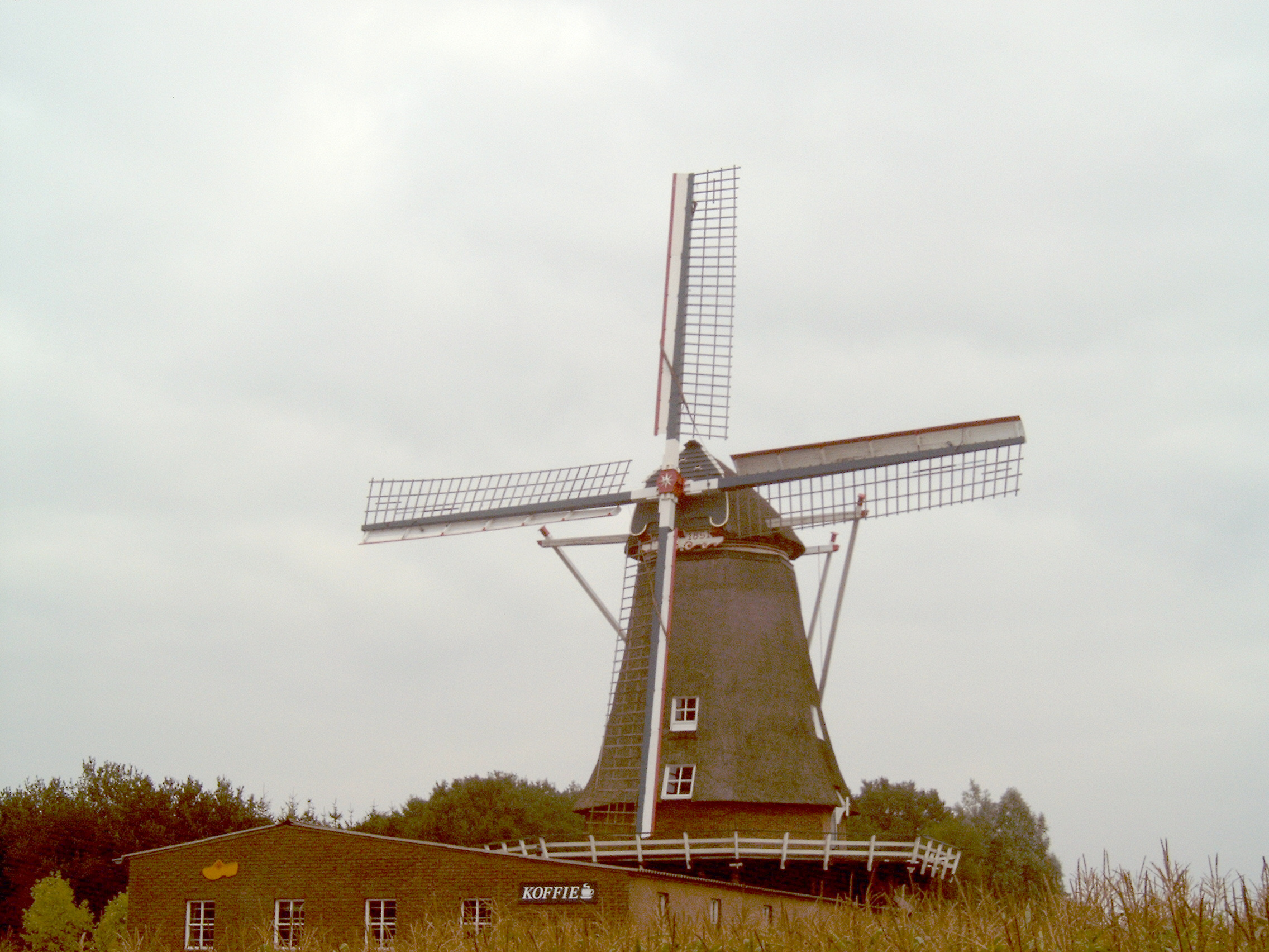 Zwiep, Zwiepse molen